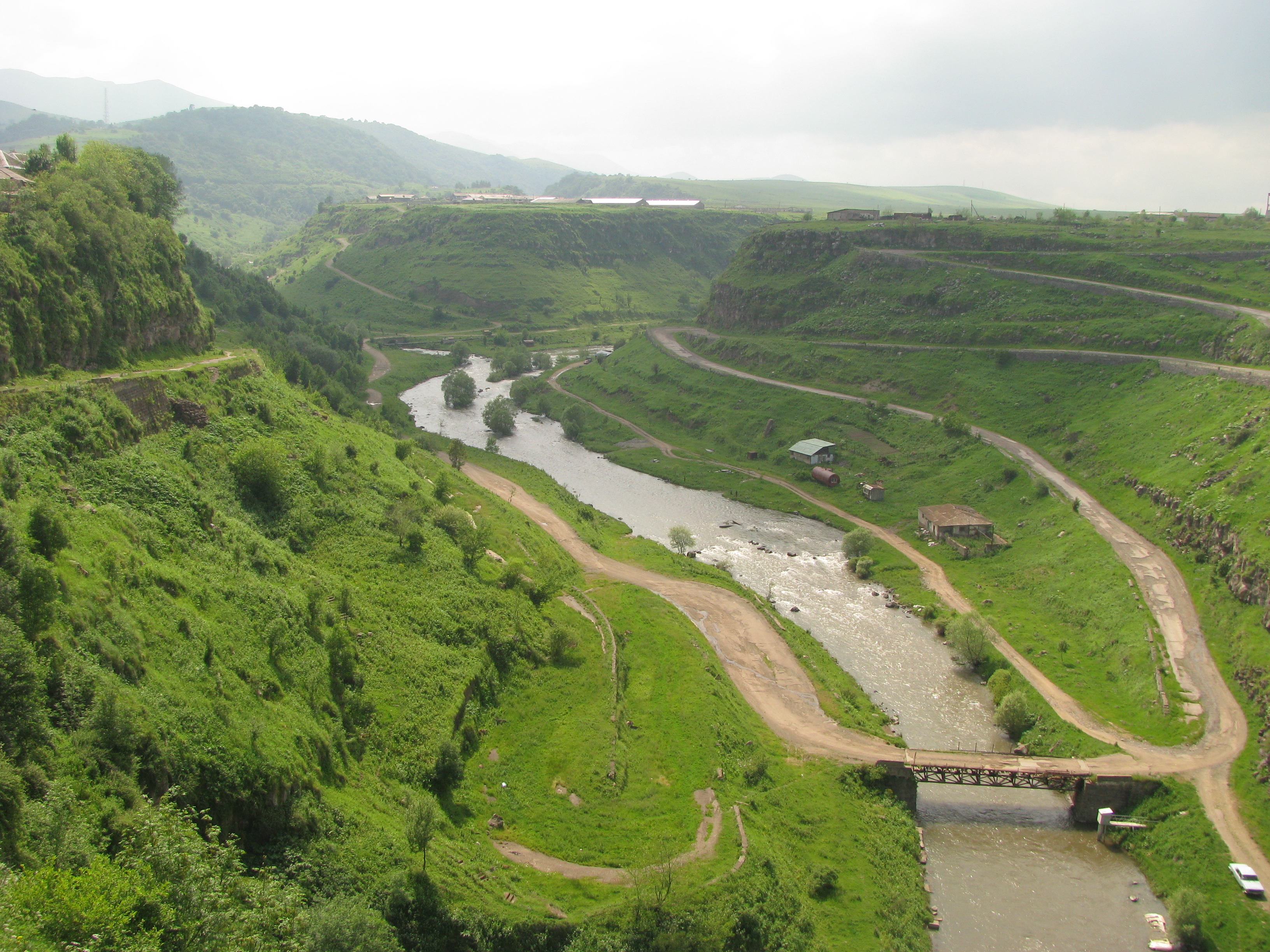 Ստեփանավան 2011